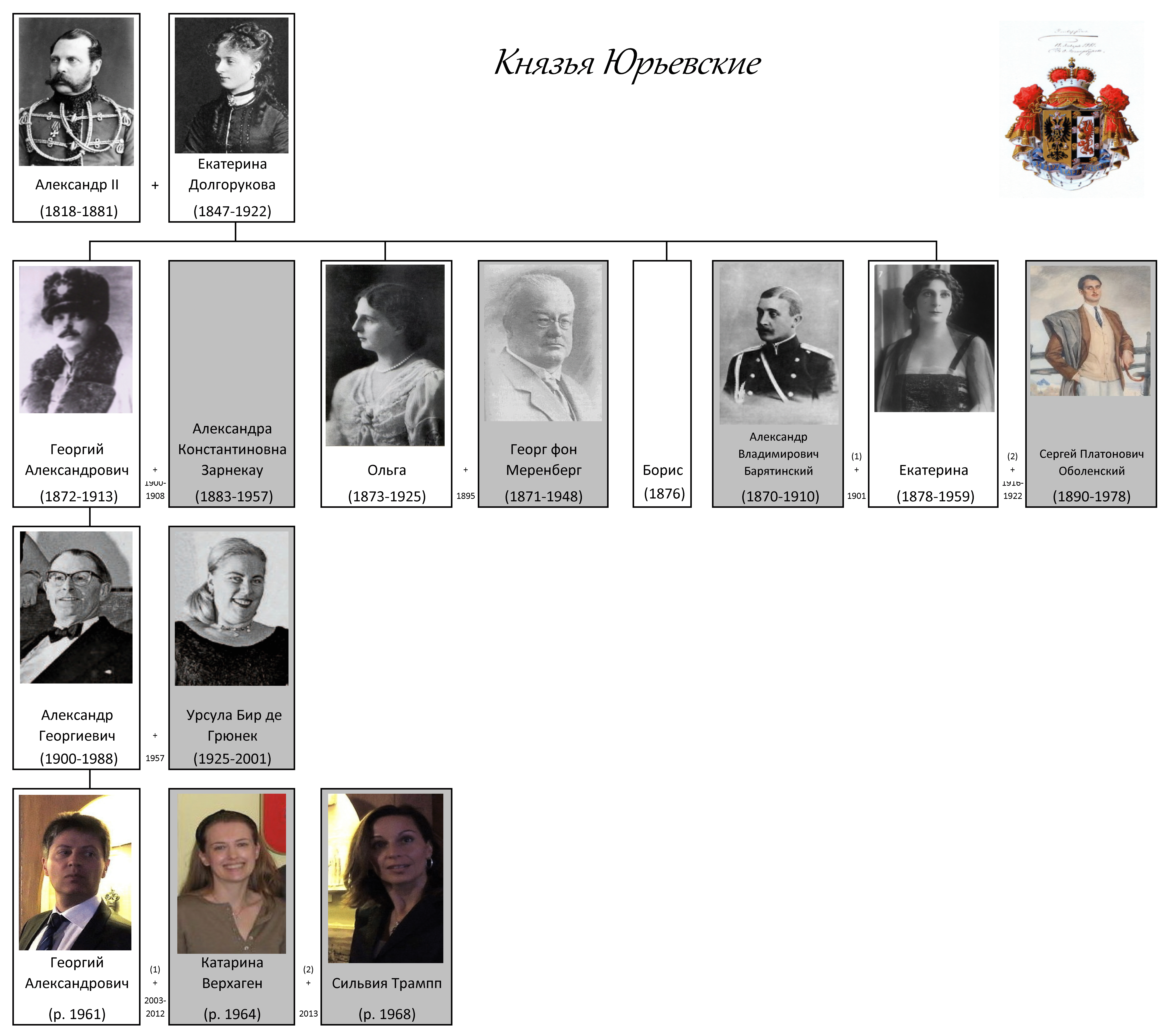 Родословная князей Юрьевских